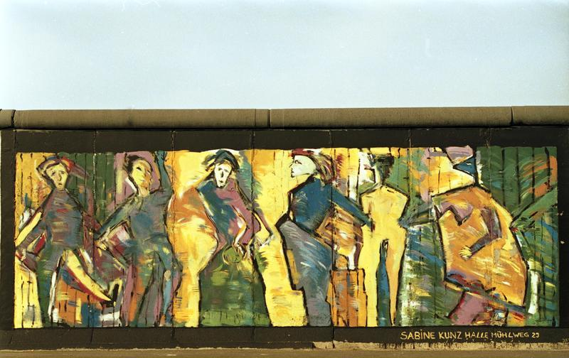 25.7.1991 "East-Side-Galery", gelegen zwischen der Jannowitzbrücke und der Oberbaumbrücke Reste der Berliner Mauer, die nach der Öffnung von vorwiegend ostdeutschen Künstlern auf der Ost-Seite bemalt wurden.